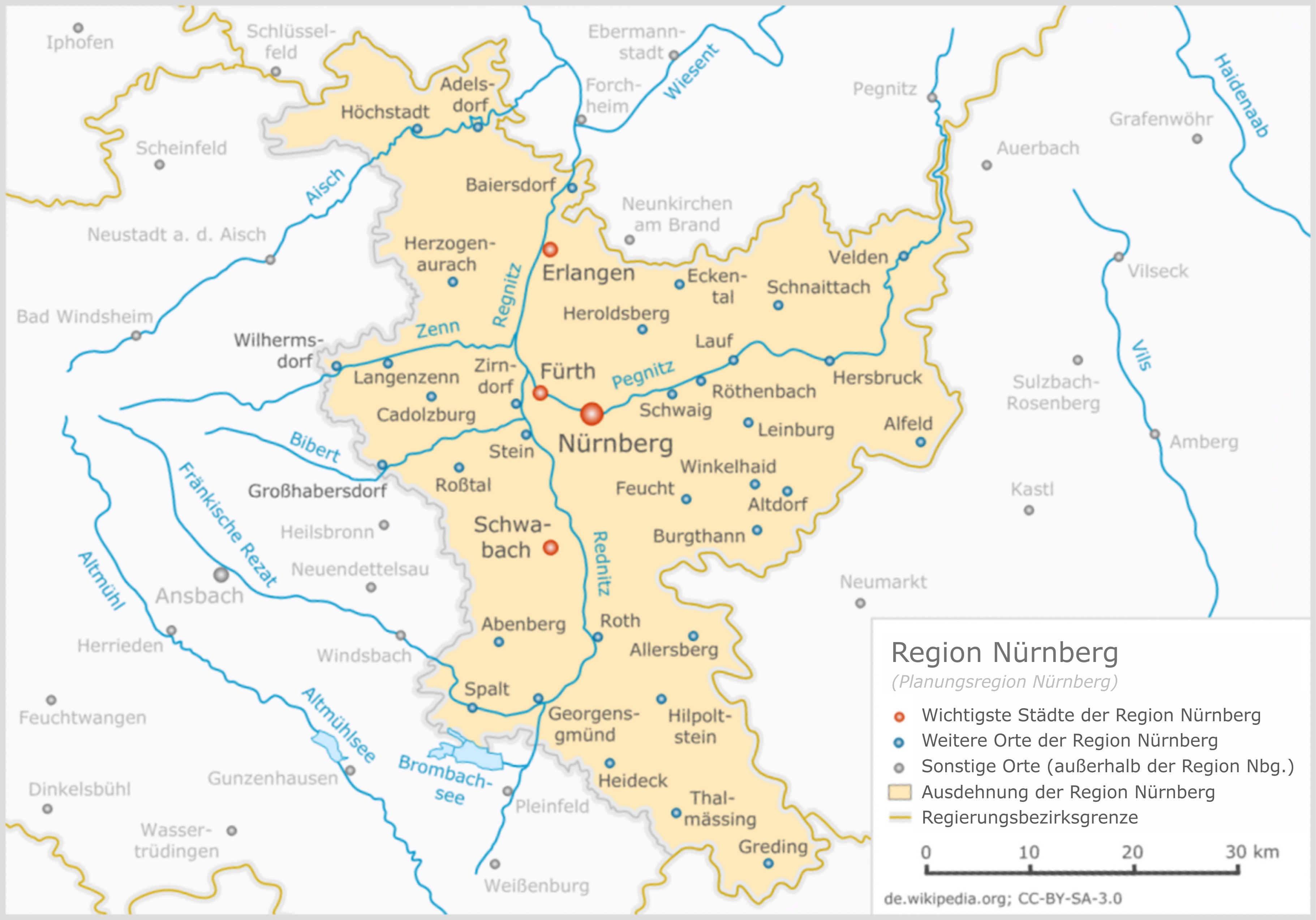 Planungsregion Industrieregion Mittelfranken